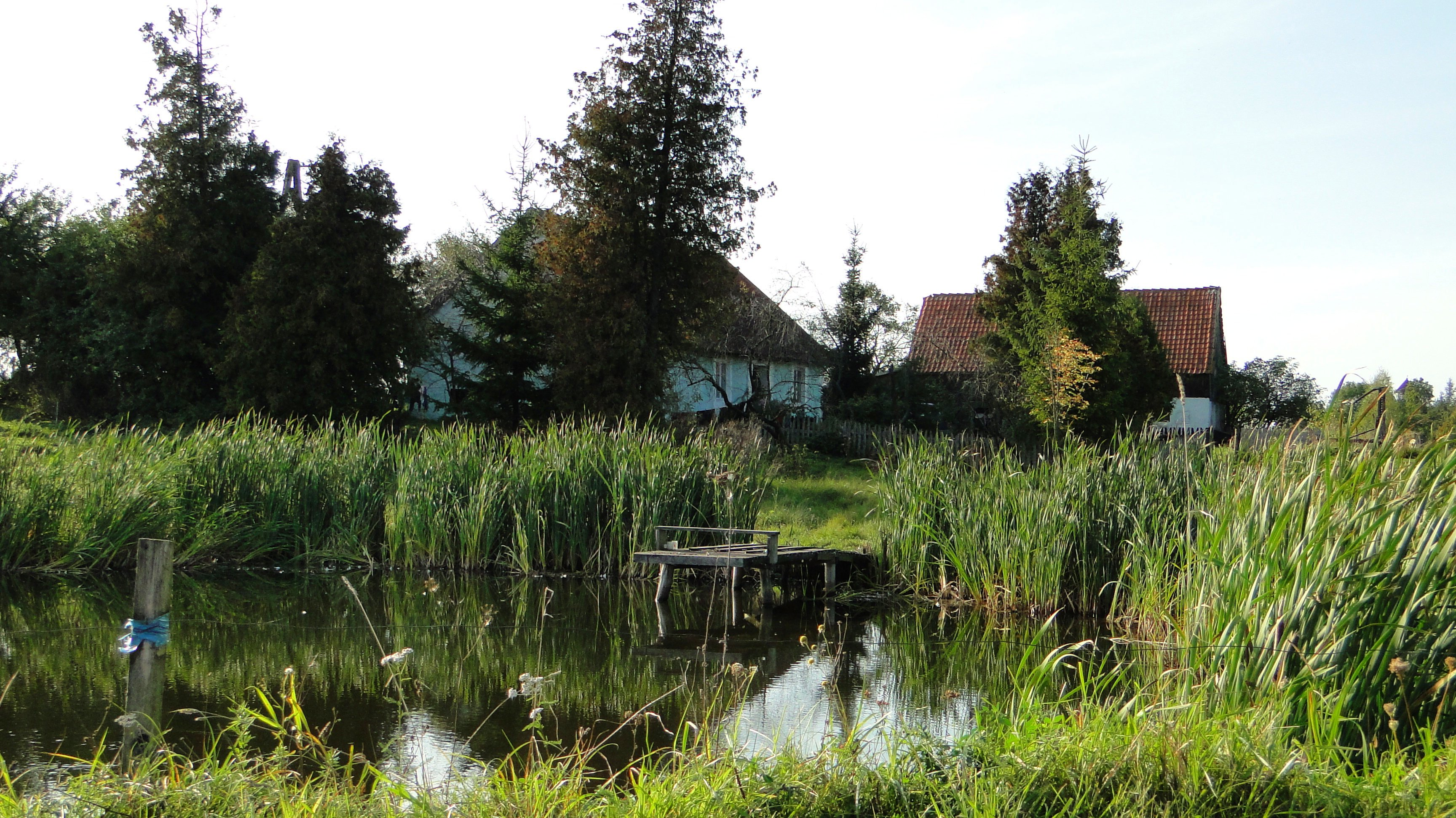 Mazurskie gospodarstwo